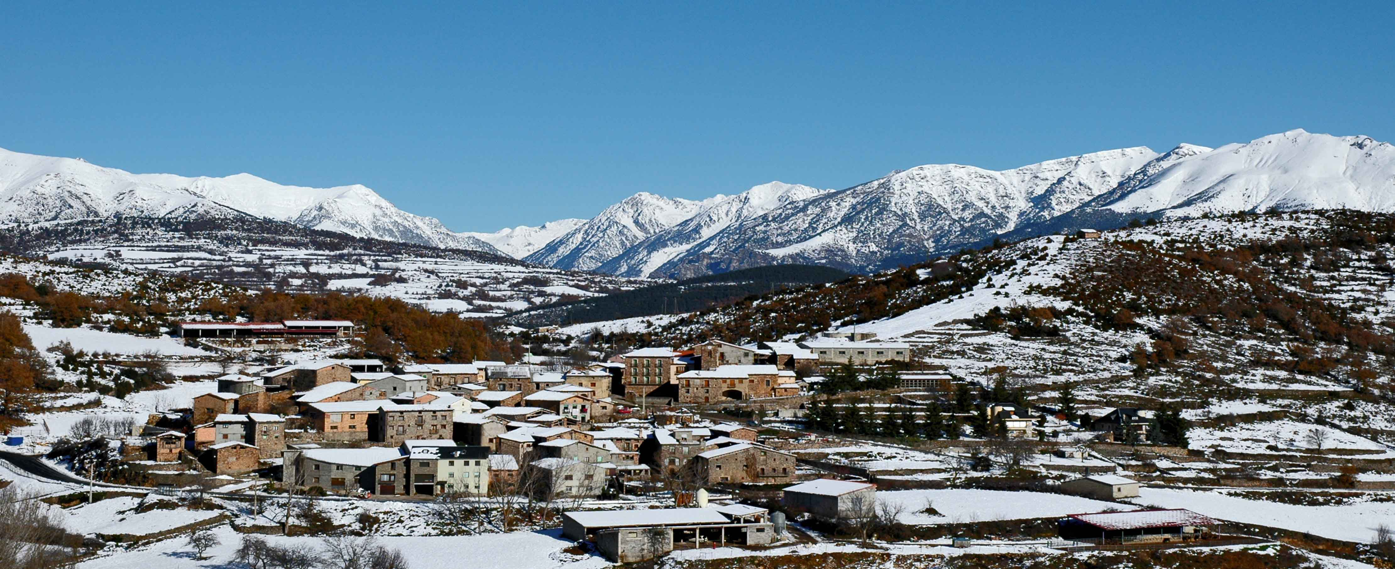 Vista de Bonansa, Aragón, España con nieve.